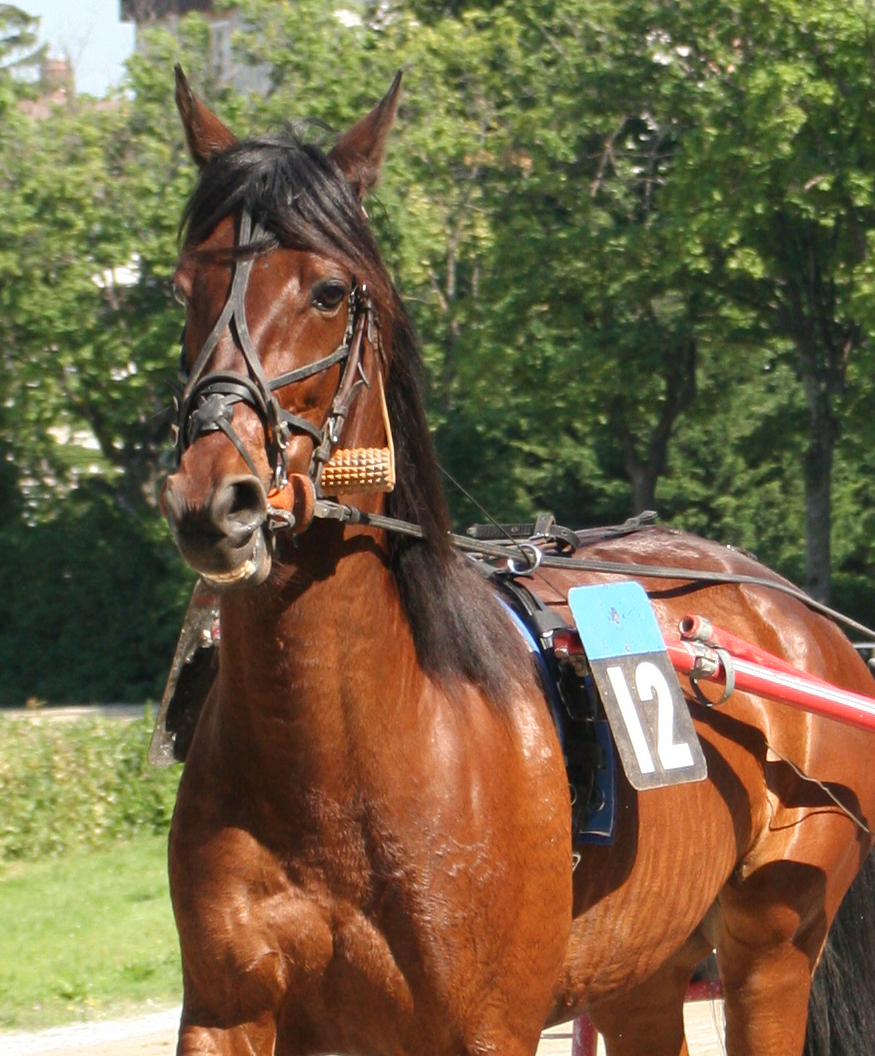 Pullrolle und Schaumgummigebiss